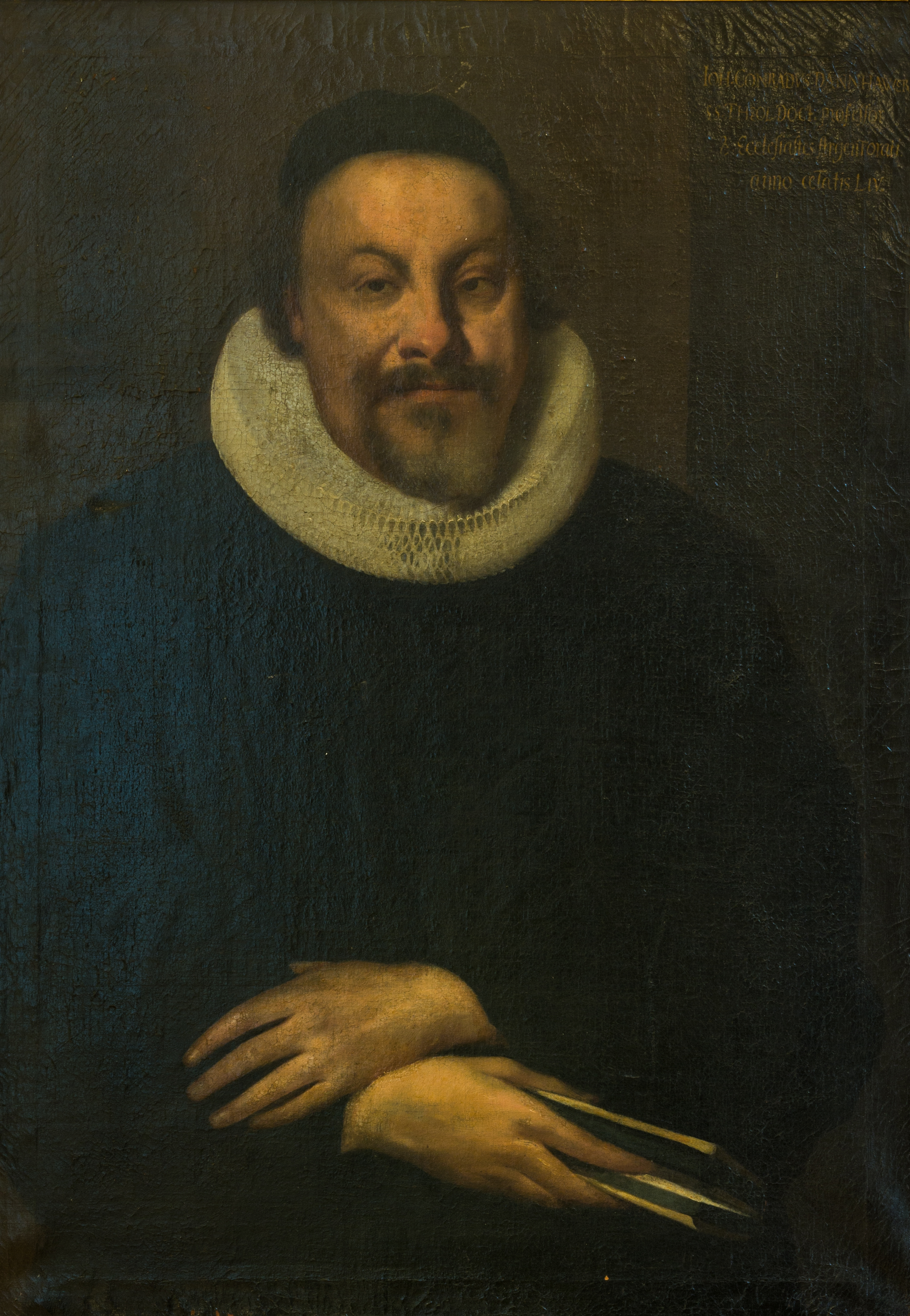 Jean Conrad Dannhauer (1603-1666), professeur de théologie à l'Université de Strasbourg. Portrait à l'huile sur toile à l'âge de 54 ans. Collections du Chapitre de Saint-Thomas à Strasbourg, salle Capiton